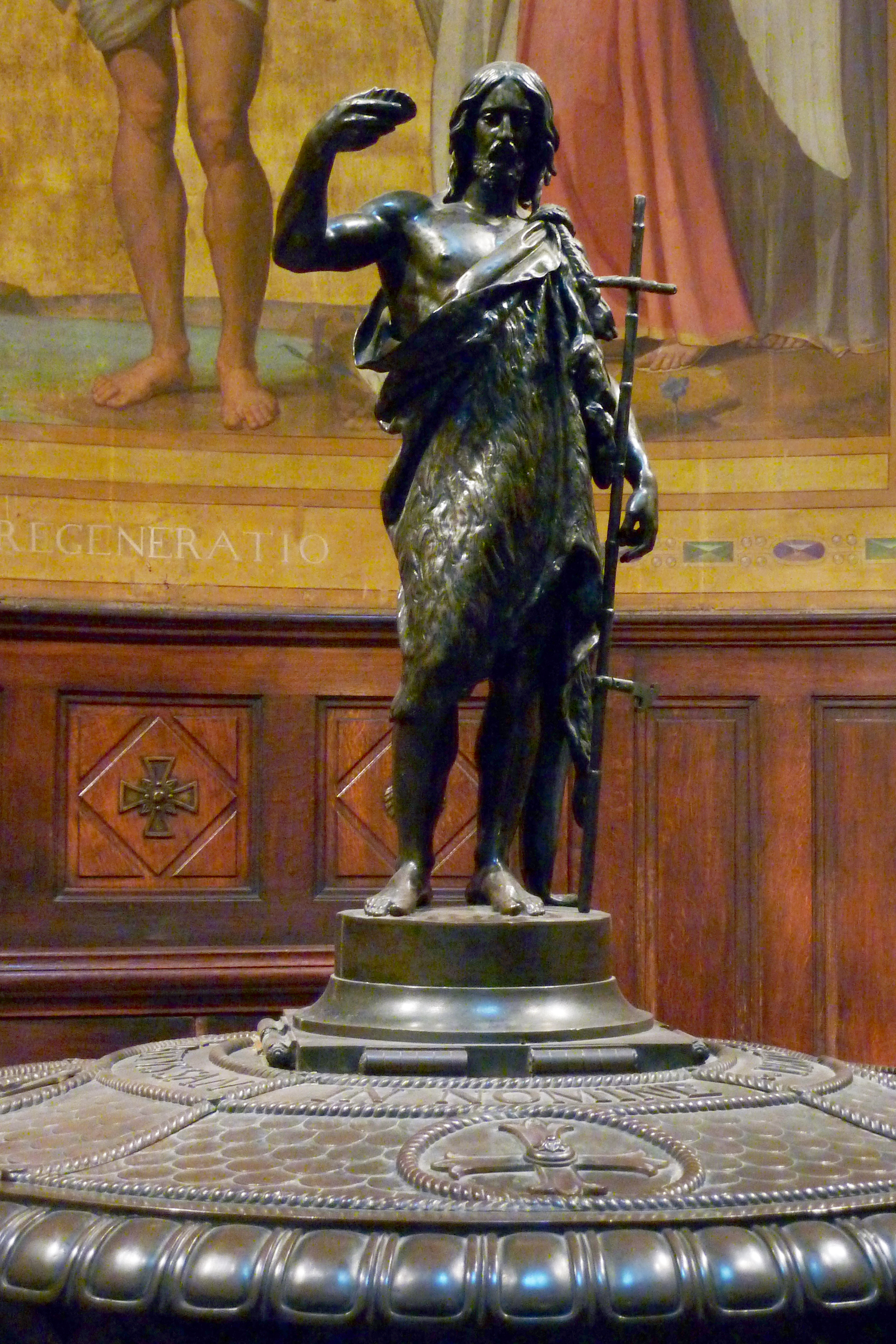 Deckel des Taufbecken mit einer Skupltur Johannes des Täufers in der katholischen Pfarrkirche Notre-Dame-de-Lorette in Paris